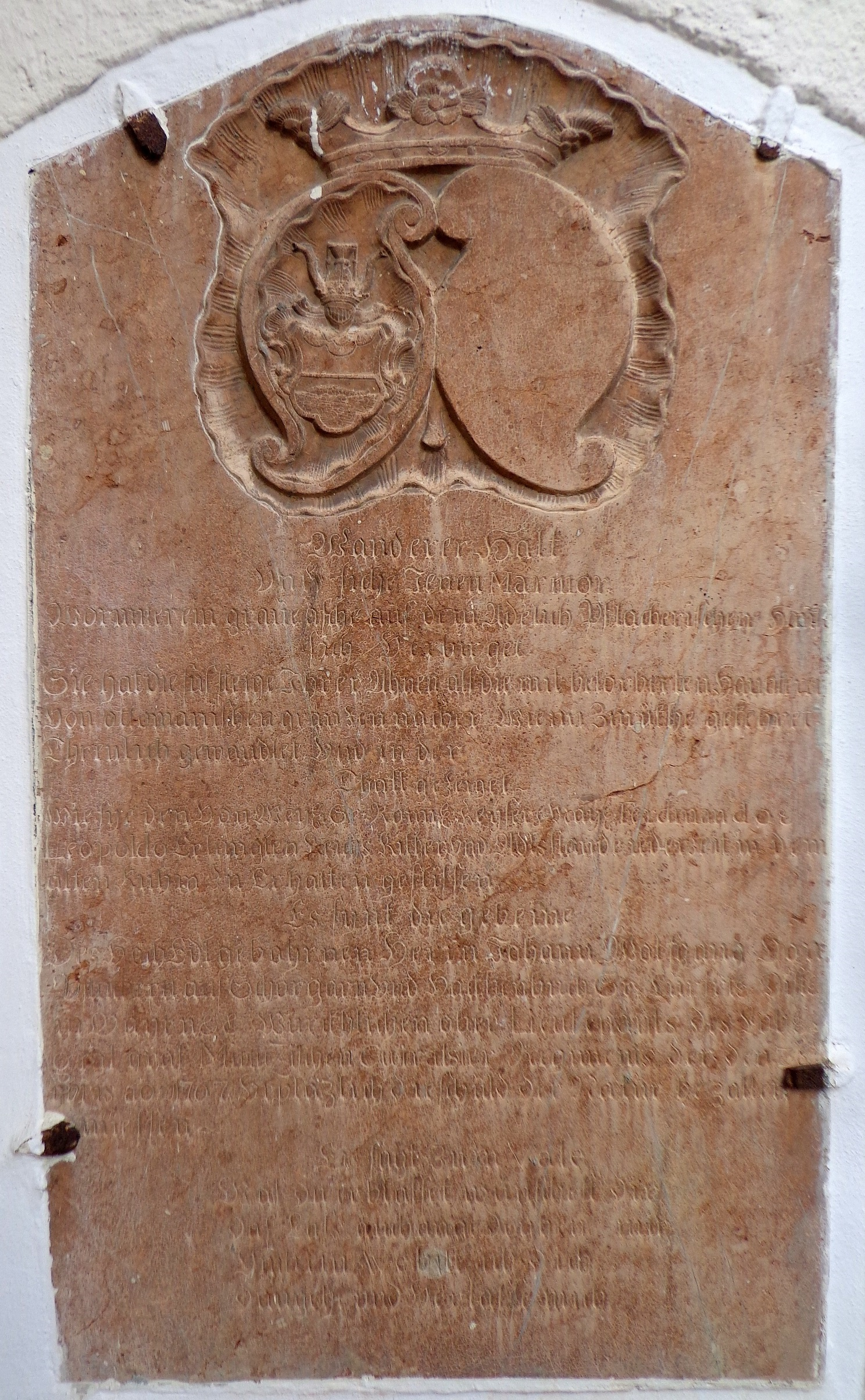 Grabdenkmal des Johann Wolfgang von Pflachern (+ 1767) an der Pfarrkirche von Sankt Marienkirchen bei Schärding. Eine wissenschaftliche Bearbeitung liegt vor in SEDDON Christopher R., Die inschriftlichen Denkmäler der Herren und Freiherren von Hackledt. Grablegen, Memoria und Repräsentation eines Innviertler Landadelsgeschlechtes, Wien (Dipl. Arb.) 2002, S. 190-193.